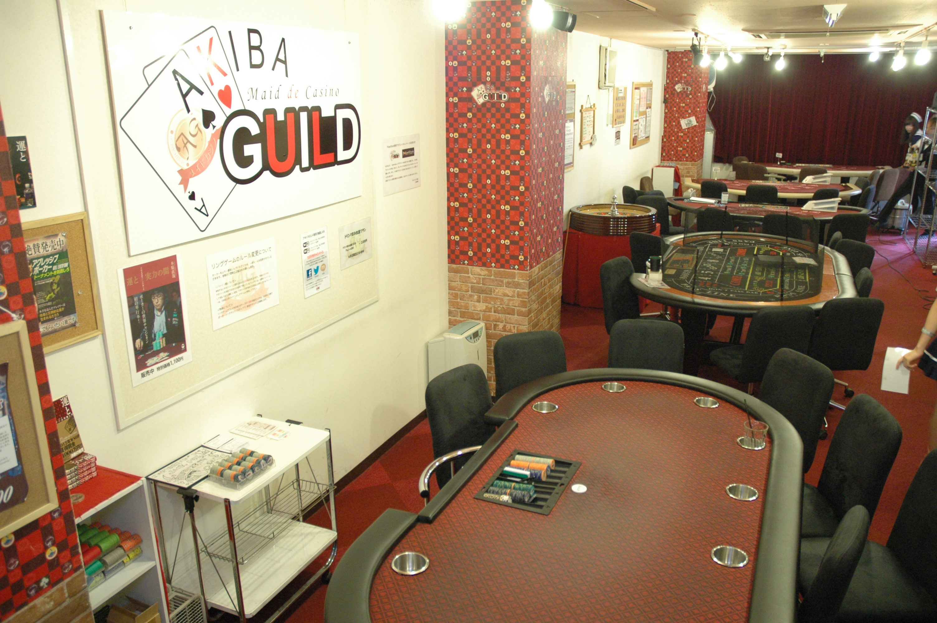 アキバギルドの店内 東京都千代田区外神田1丁目11-6 小暮ビル4階